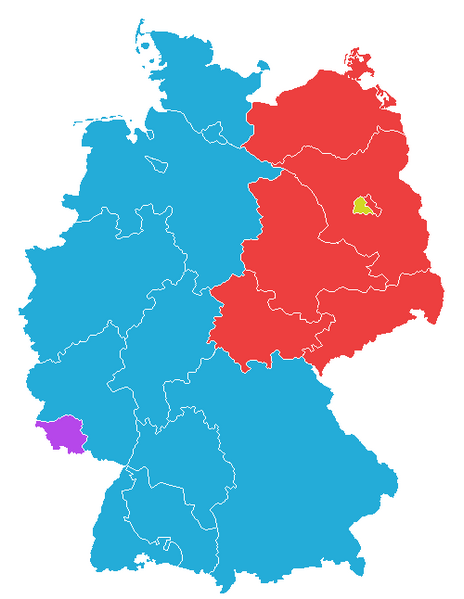 Länder nach Gründung der Bundesrepublik und der DDR. Saargebiet und West-Berlin haben Sonderstatus. Blau: Bundesrepublik Deutschland Rot: Deutsche Demokratische Republik Gelb: West-Berlin (bei den Alliierten nicht als Bundesland der BRD anerkannt) Mauve: Saarland (französisches Protektorat mit einer eigenen Regierung bis 1956) Versionsgeschichte